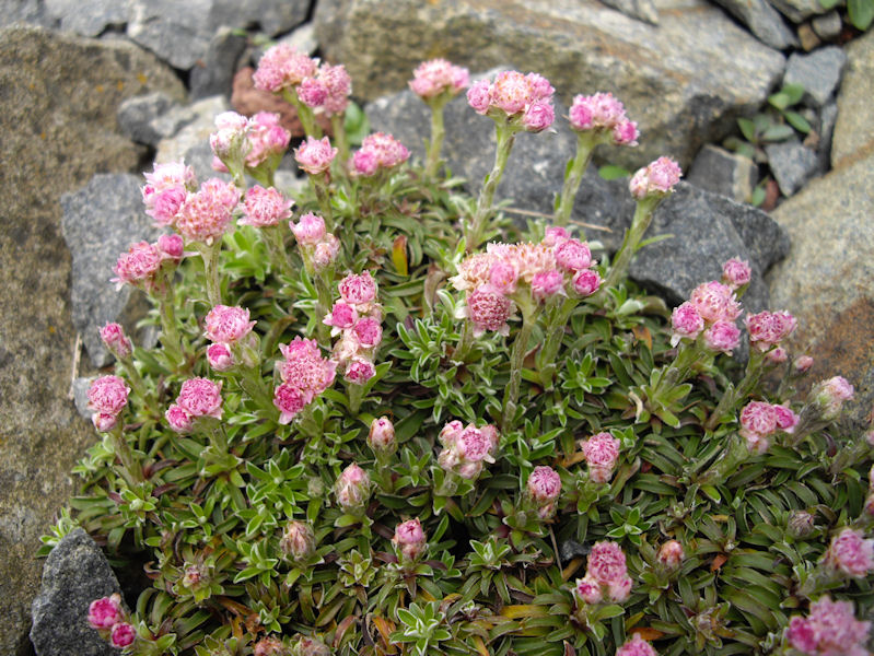 Antennaria dioica 'Minima'